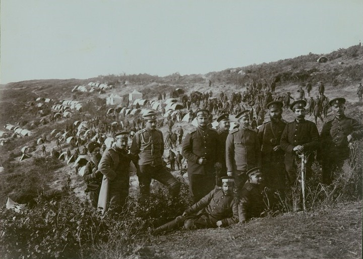 Български офицери и войници от Седемнадесети пехотен доростолски полк на Чаталджанските позиции. На заден план е българският лагер.